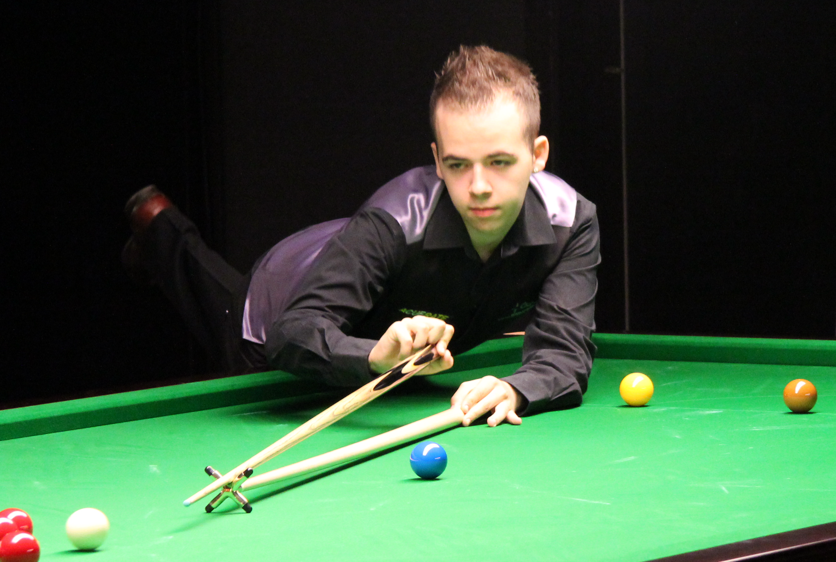 Luca Brecel beim Paul Hunter Classic 2011